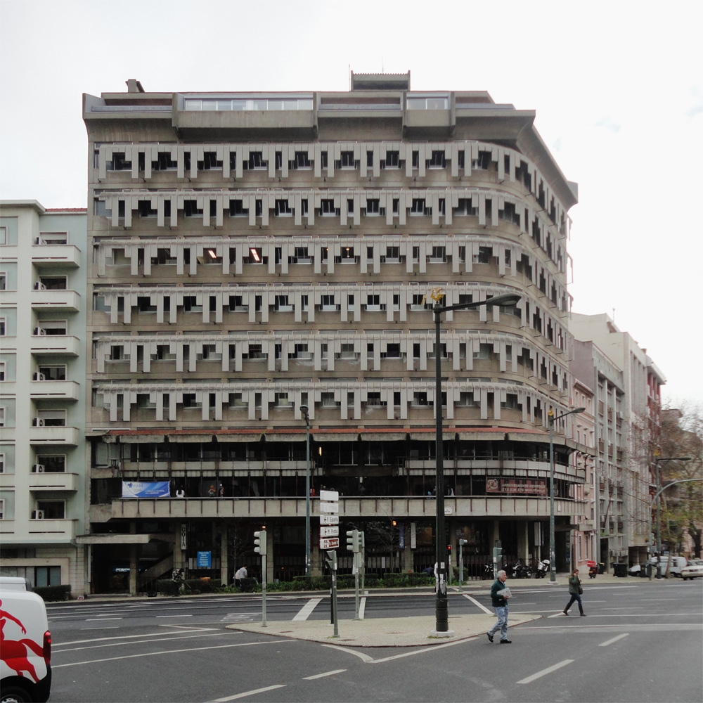 Edifício "Franjinhas", Rua Castilho, Lisboa; Arq. Teotónio Pereira